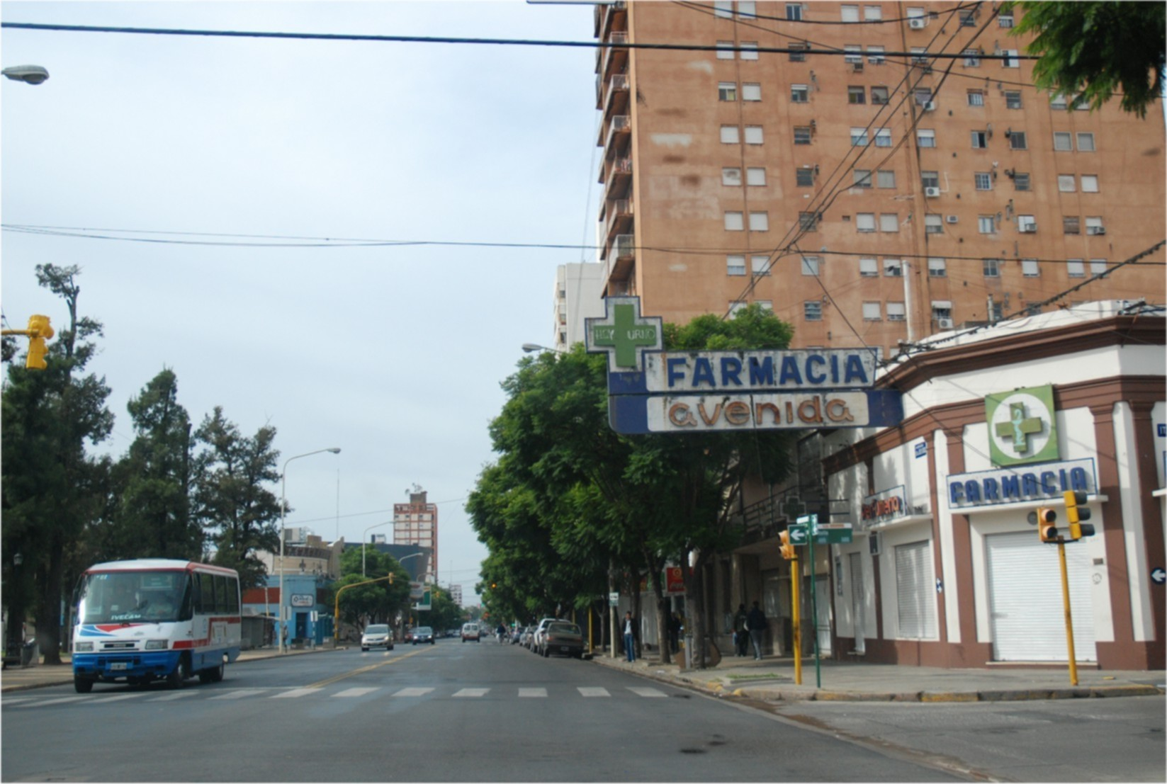 Avenida Julio A. Roca, Pergamino, provincia de Buenos Aires, Argentina